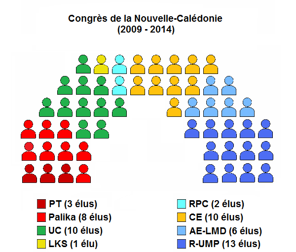 Congrès de la Nouvelle-Calédonie après les élections de 2009.